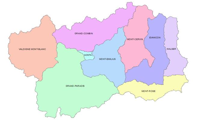 k